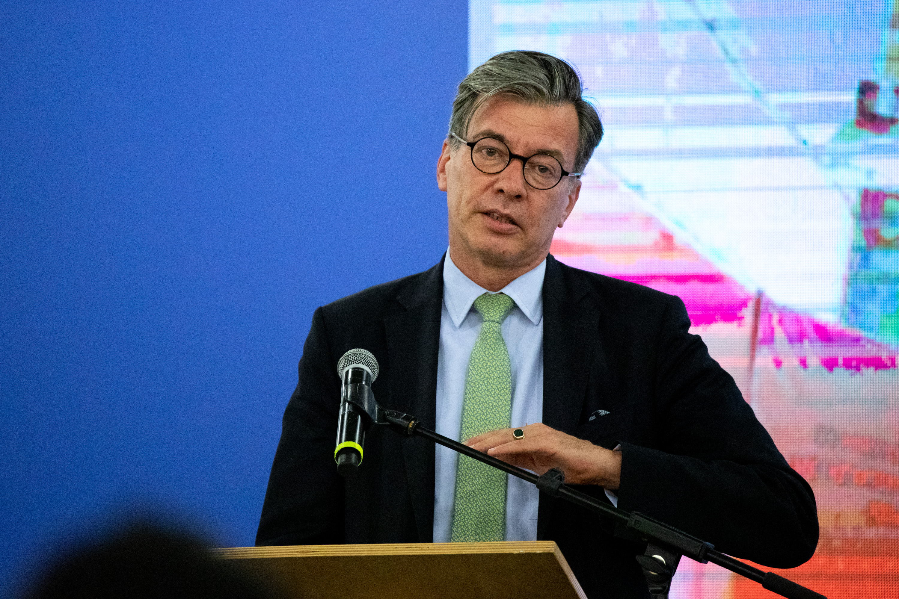 Christian Heldt in seiner Funktion als deutscher Botschafter im Kosovo hält einen Vortrag auf der State of the Map South East Europe